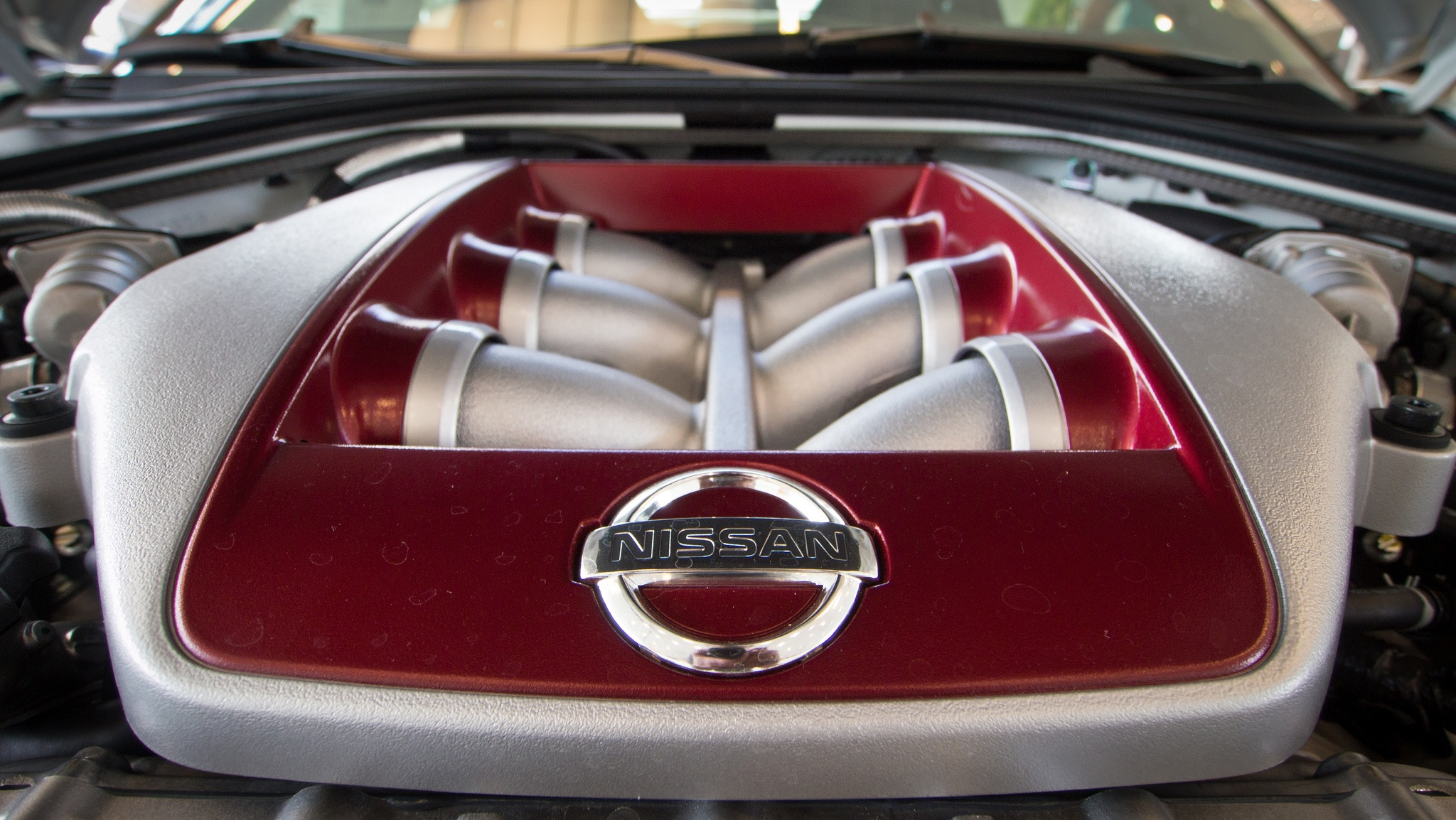 2012 Nissan GT-R engine